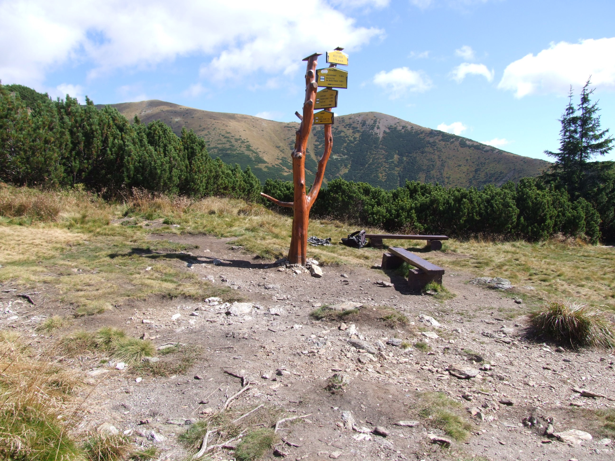 Rozdroże szlaków na Gołym Wierchu (w grzbiecie Barańca)